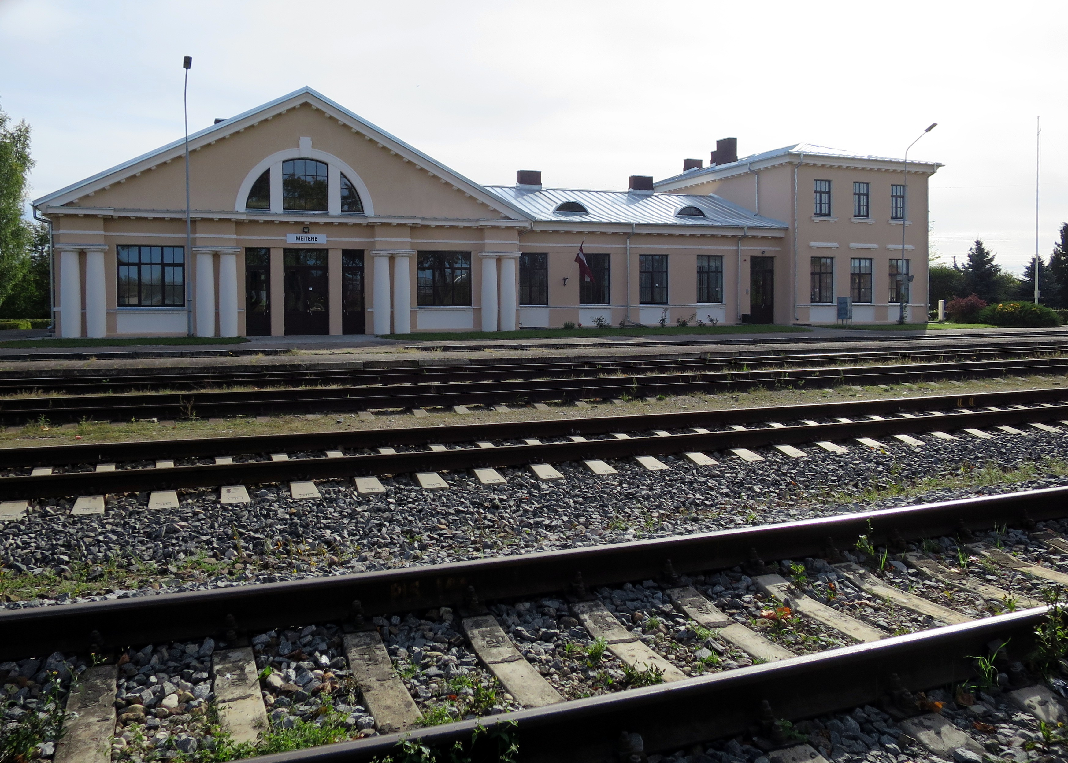 Meitenes dzelzceļa stacija, Elejas pagasts